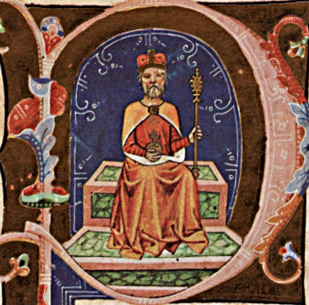 Géza on the throne